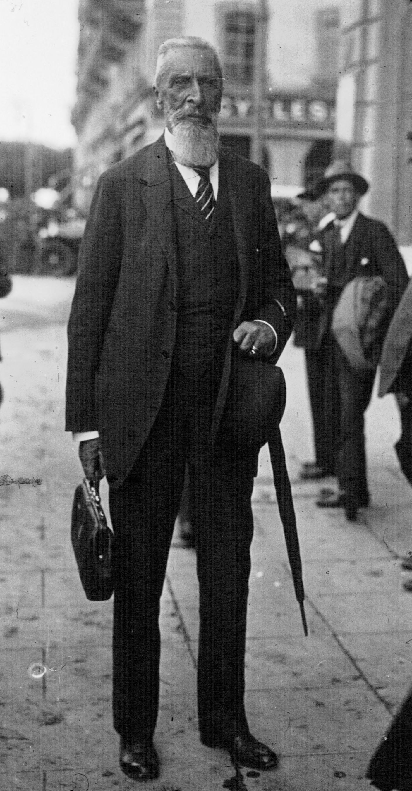 Apponyi Albert népszövetségi tárgyalásokon a magyar delegáció vezetője, 1924-ben Magyarország vállalta, hogy gazdasági életét két és fél esztendő tartamára a Népszövetség ellenőrzése alá helyezi. 1924-ben létrehozták a Magyar Nemzeti Bankot, amelyet a bankjegykibocsátás monopóliumával ruháztak fel. 1924 júniusában megszüntették az inflációt. A korona stabilizációs árfolyamát az angol fonthoz kötötték (1 font = 346 000 korona, 1 aranykorona = 17 000 papírkorona). A népszövetségi kölcsön folyósítása 1924 júliusában kezdődött; a 307 millió aranykorona névértékű összeg több mint felét - 170 milliót - Anglia, a másik felét további hat ország - főként az Egyesült Államok, Olaszország és Svájc - nyújtotta.